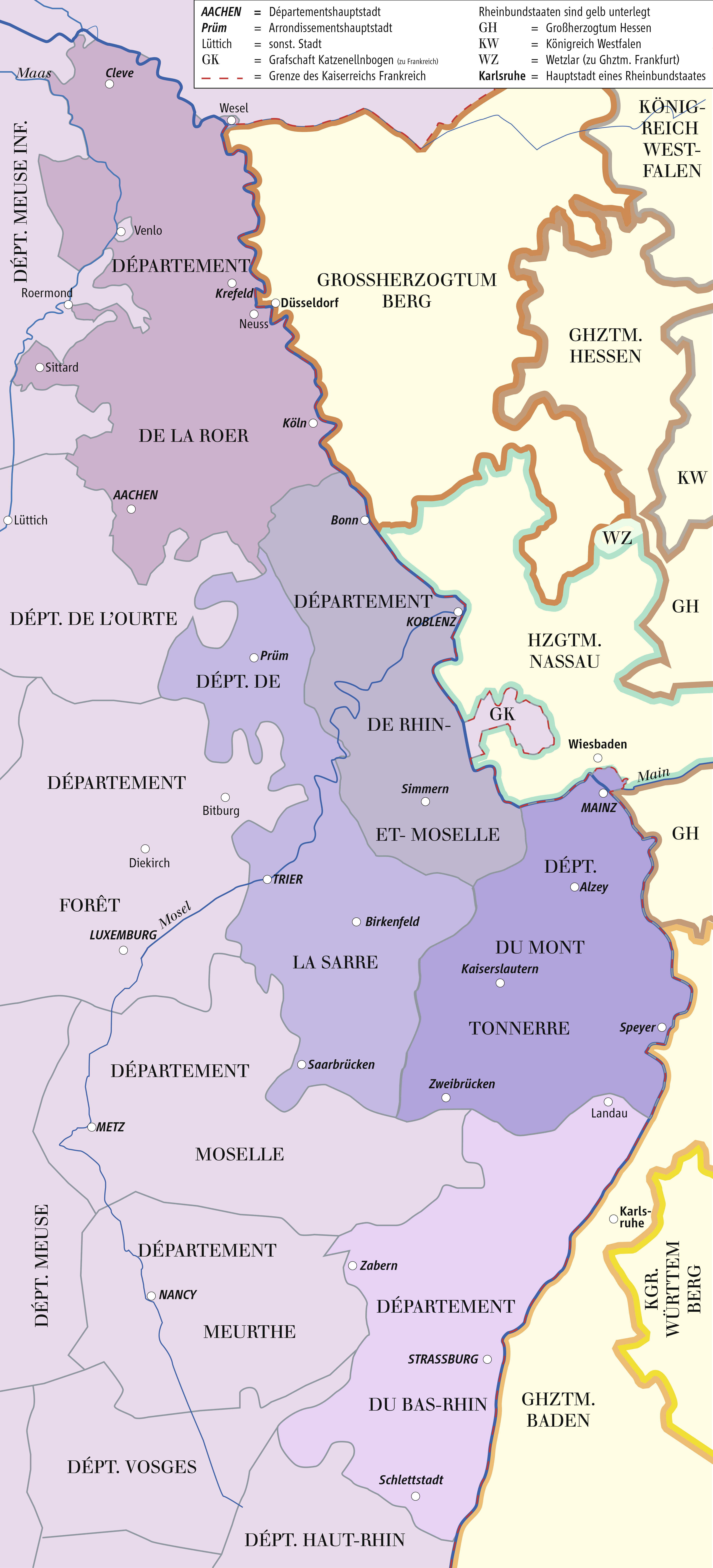 Karte der linksrheinischen Departments (1812)